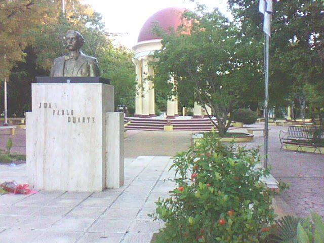 Parque Central de Azua